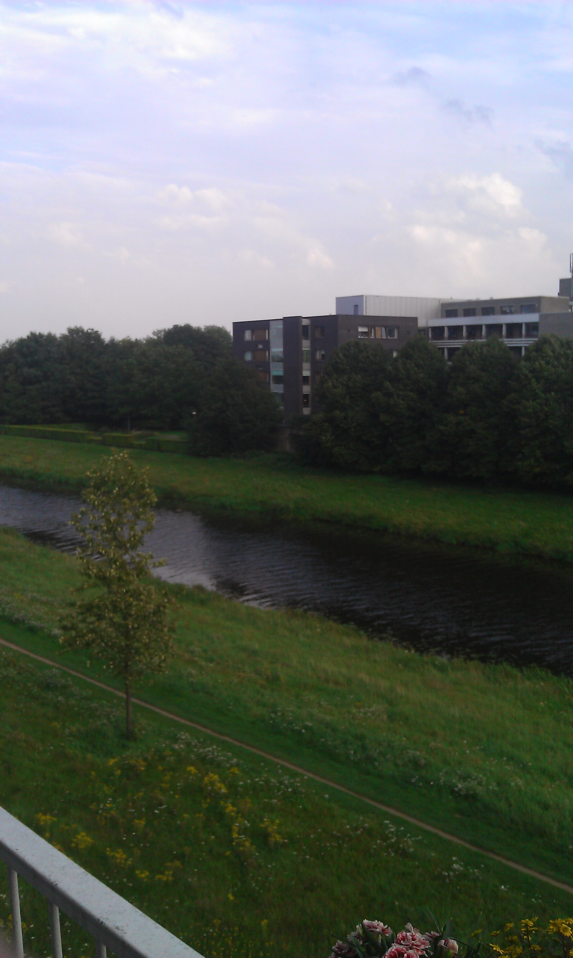 De Aa in 's-Hertogenbosch (Den Bosch) ter hoogte van de Bowierstraat